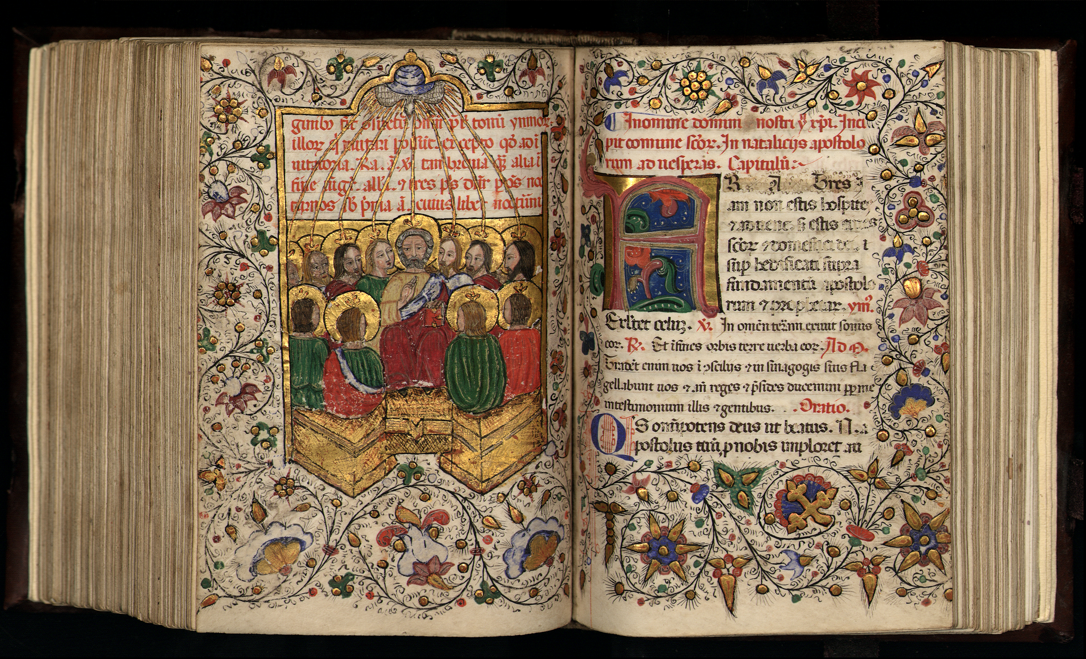 Psalterium romanum. [Venezia]: sec. XV. Membr., cc. 331 n. n. con miniature; 12x17 cm.